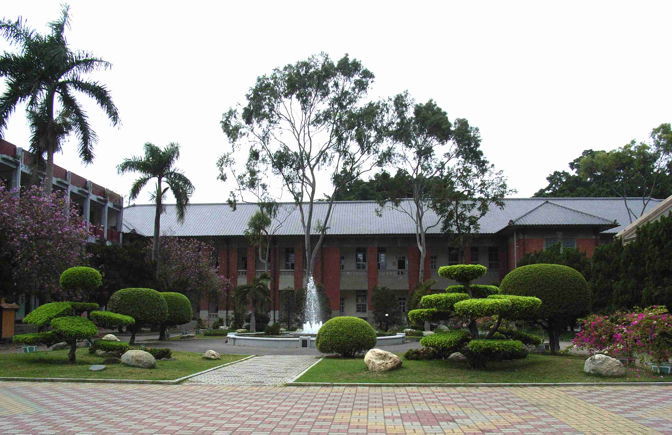 國立台南第一高級中學 - 紅樓